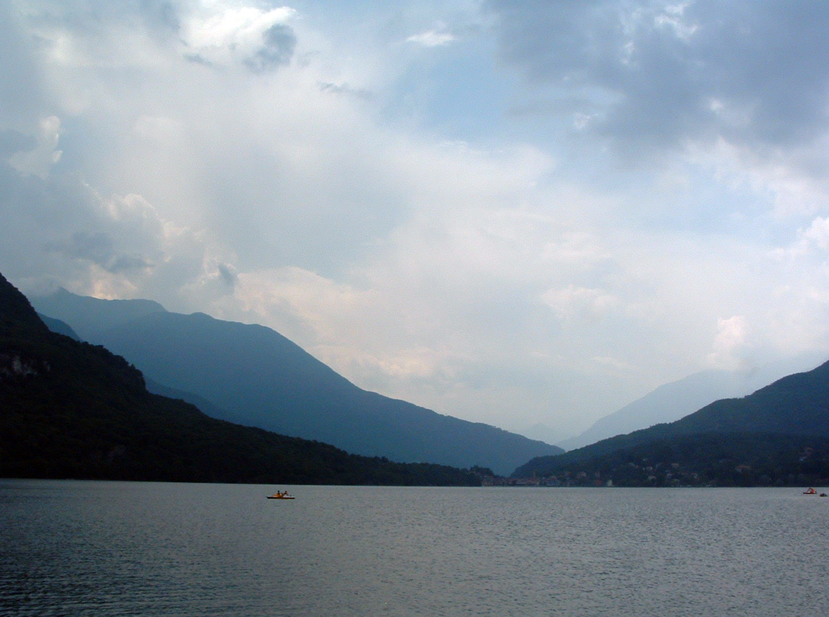 Lake Mergozzo, Piedmont